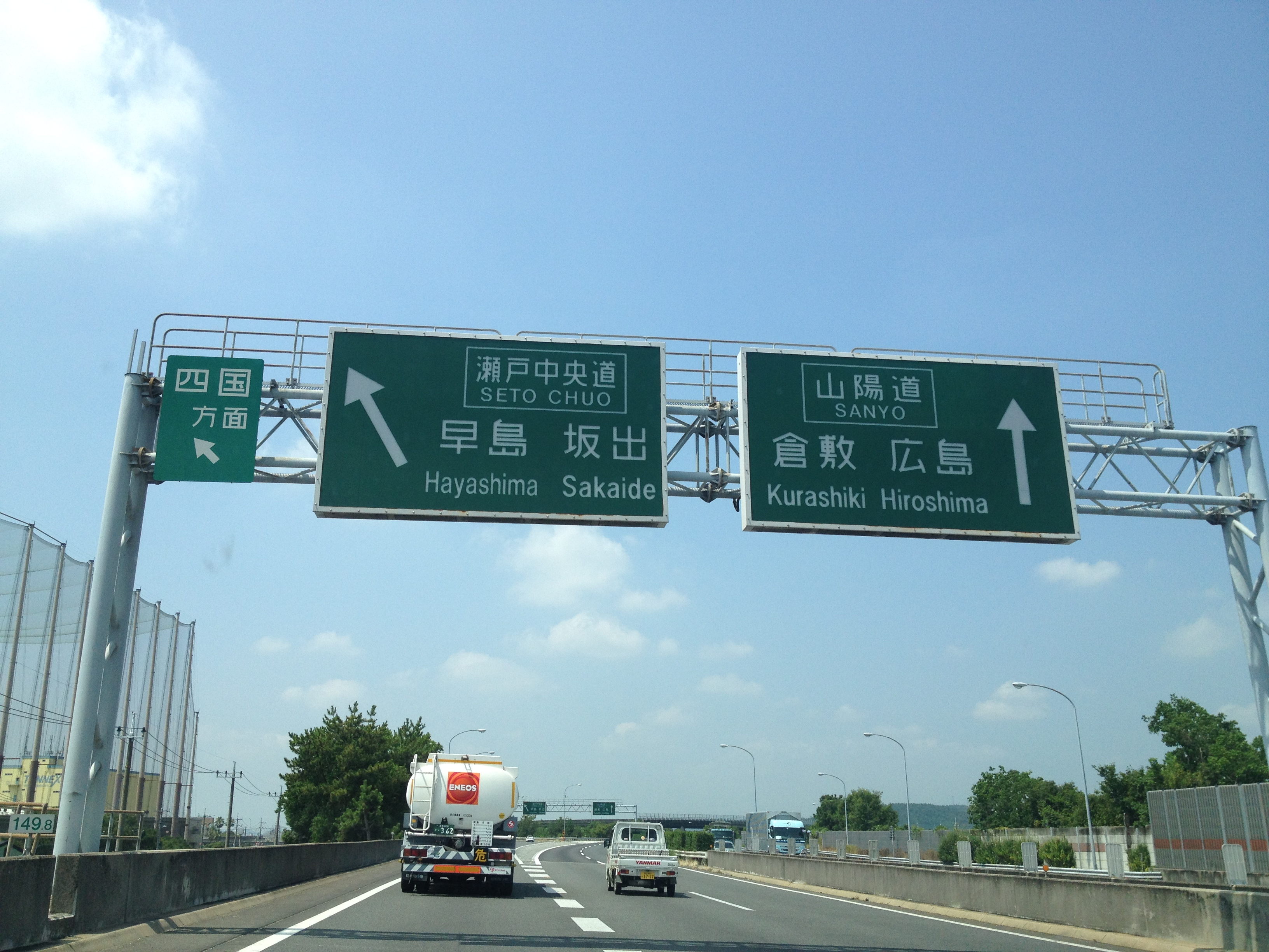 倉敷ジャンクションの標識